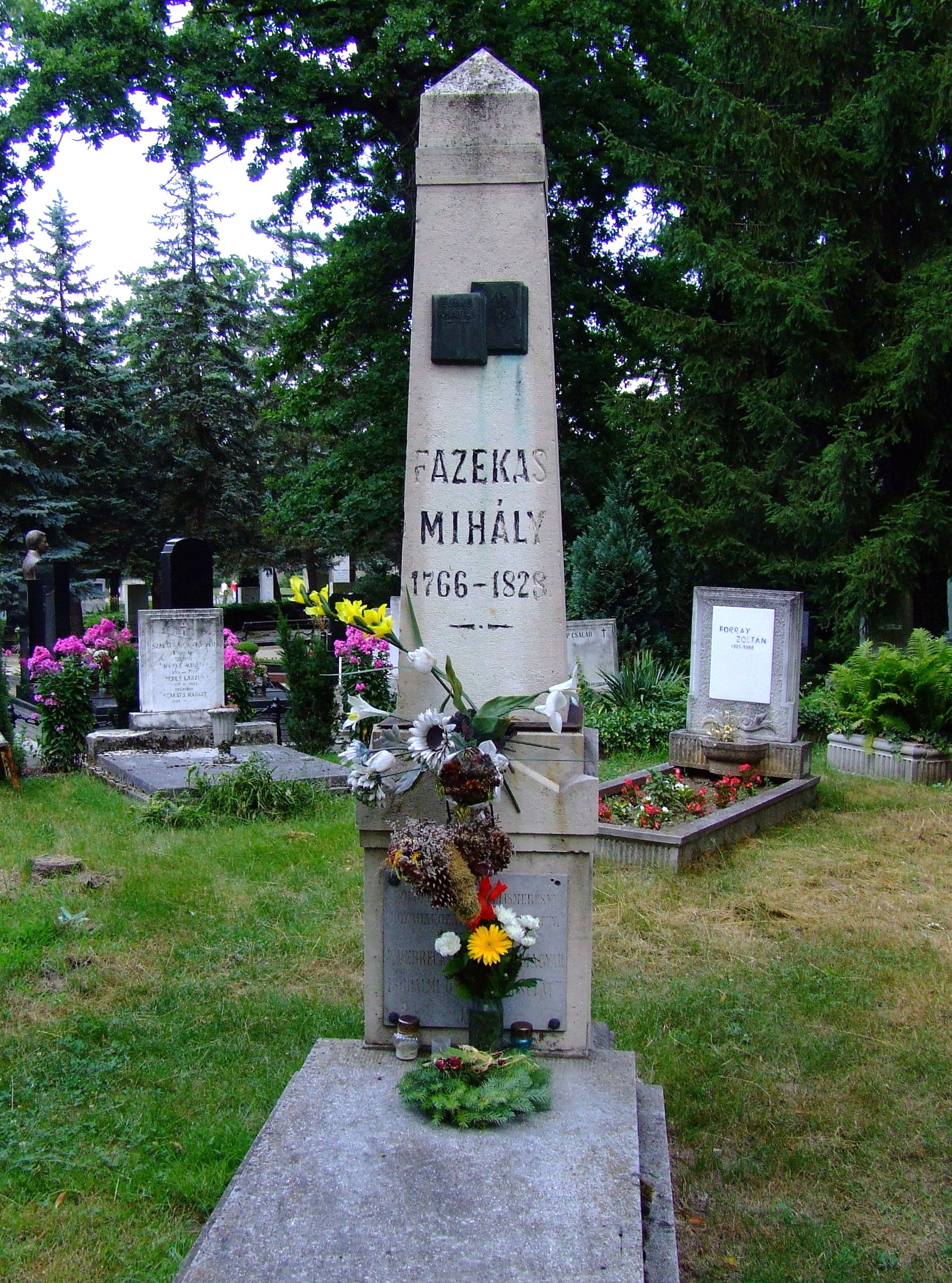 Fazekas Mihály sírja a debreceni köztemetőben. Tervezte: Tóth András